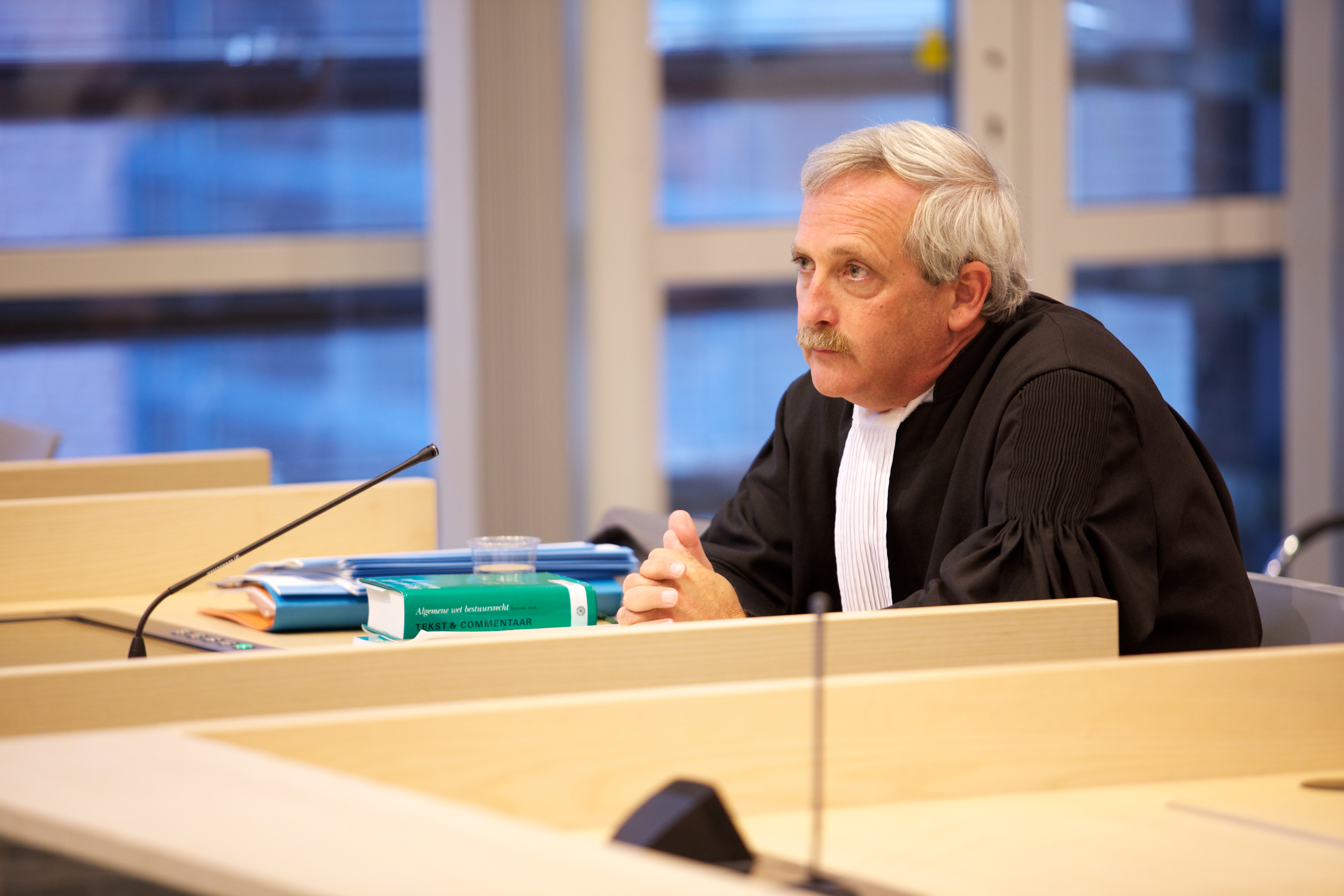 Plaatsvervangend landsadvocaat Eric Daalder. Lise Witteman, politiek verslaggever van NU.nl, heeft een kortgeding aangespannen tegen het Ministerie van Financiën omdat ze het niet eens is met de de afhandeling van een Wob verzoek dat ze bij het Ministerie van Financiën heeft gedaan. Lise Witteman werd bijgestaan en vertegenwoordigd door onderzoeksjournalist, collega en wob expert Brenno de Winter. Het Ministerie van Financiën werd vertegenwoordigd door plaatsvervangend landsadvocaat Eric Daalder. Op 30 augustus volgt de uitspraak.